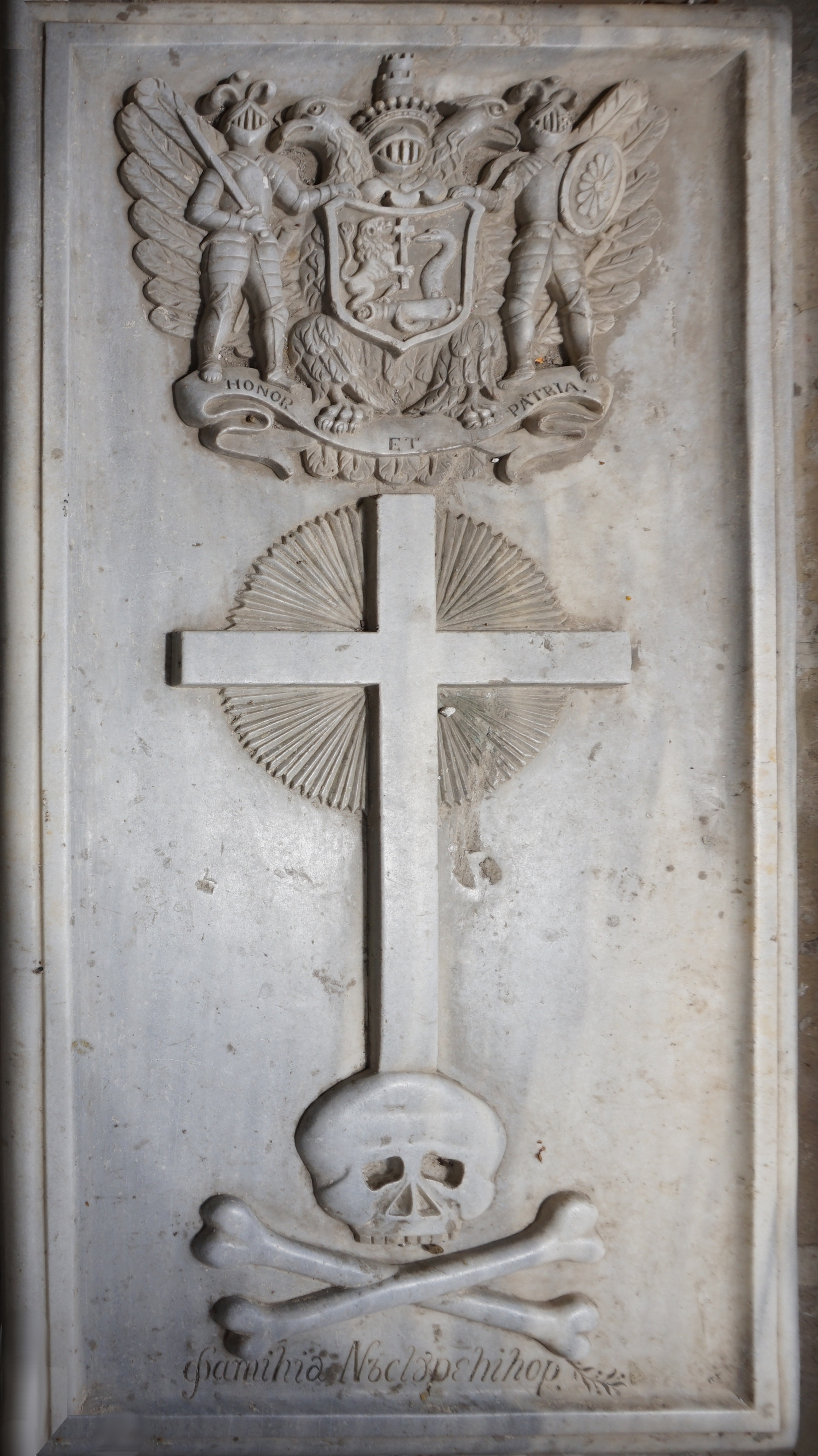 Biserica „Sf. Treime” din Herăști, cod LMI GR-II-m-A-15013.02. Piatră tombală în pridvor 02